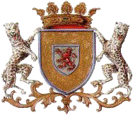 Wapenschild van Passendale.